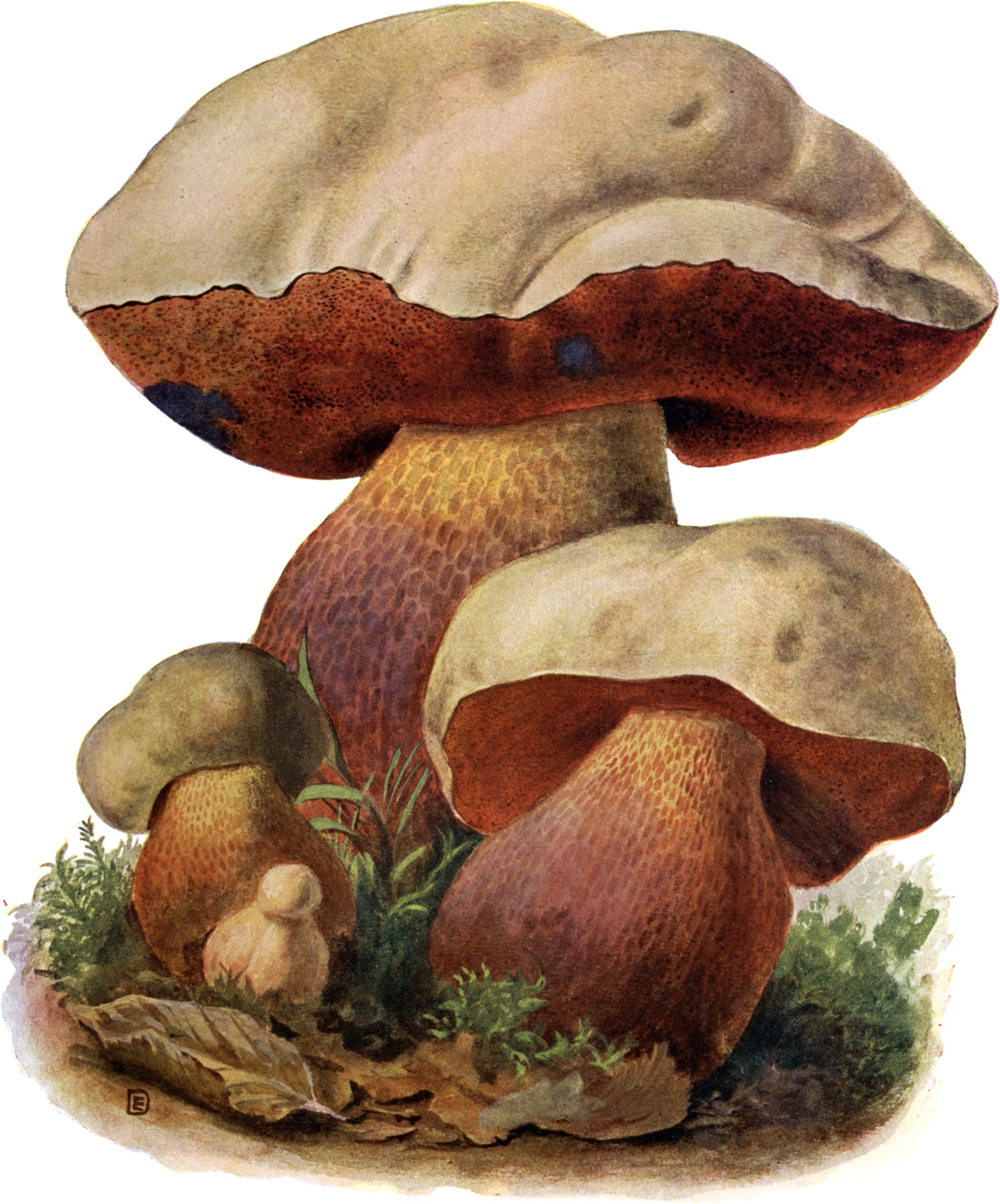 Satanspilz; Boletus satanas. Giftig.